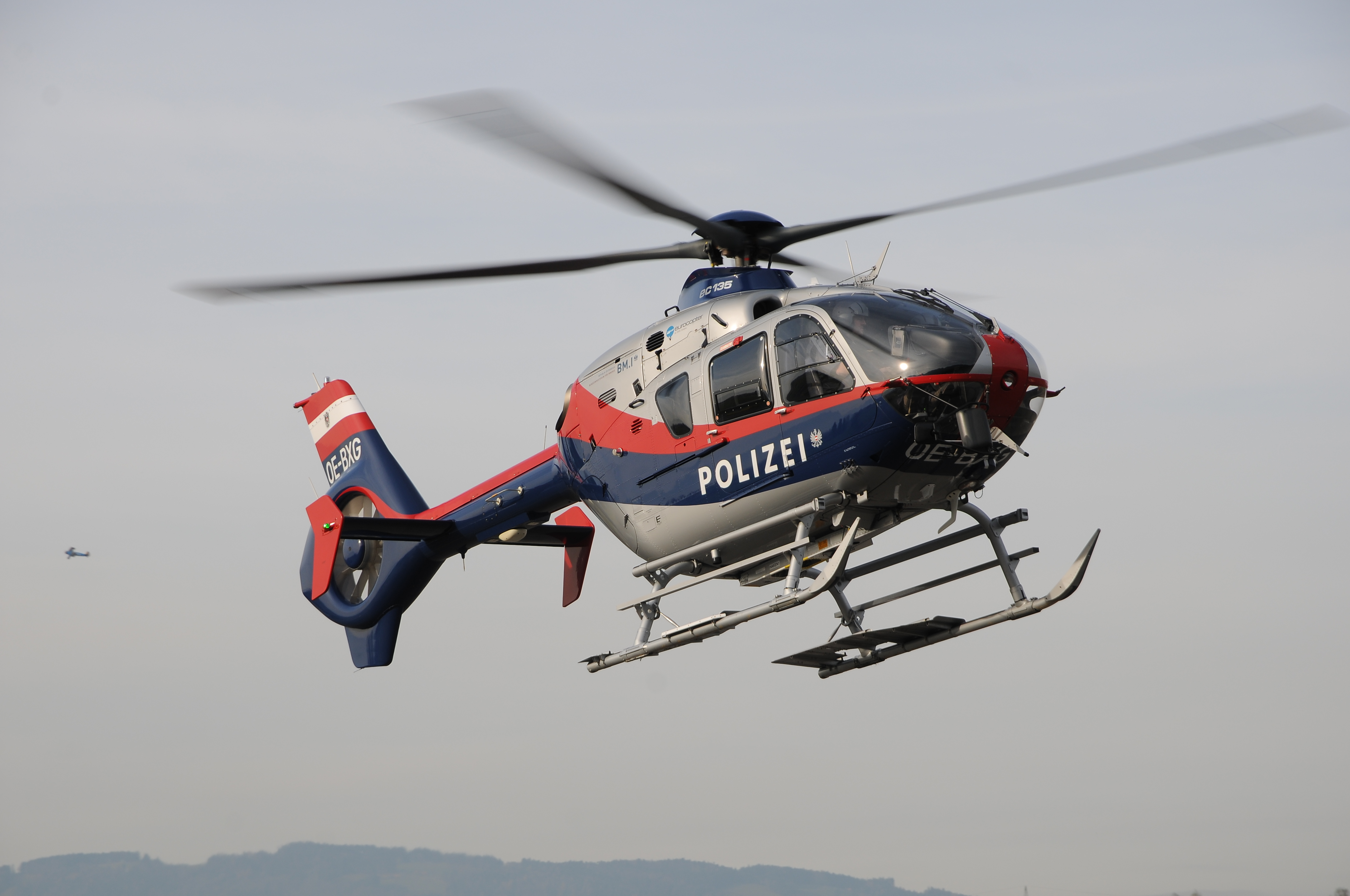 Eurocopter EC 135 Hubschrauber der Flugpolizei des Bundesministerium für Inneres der Republik Österreich stationiert am Hohenemser Flughafen.